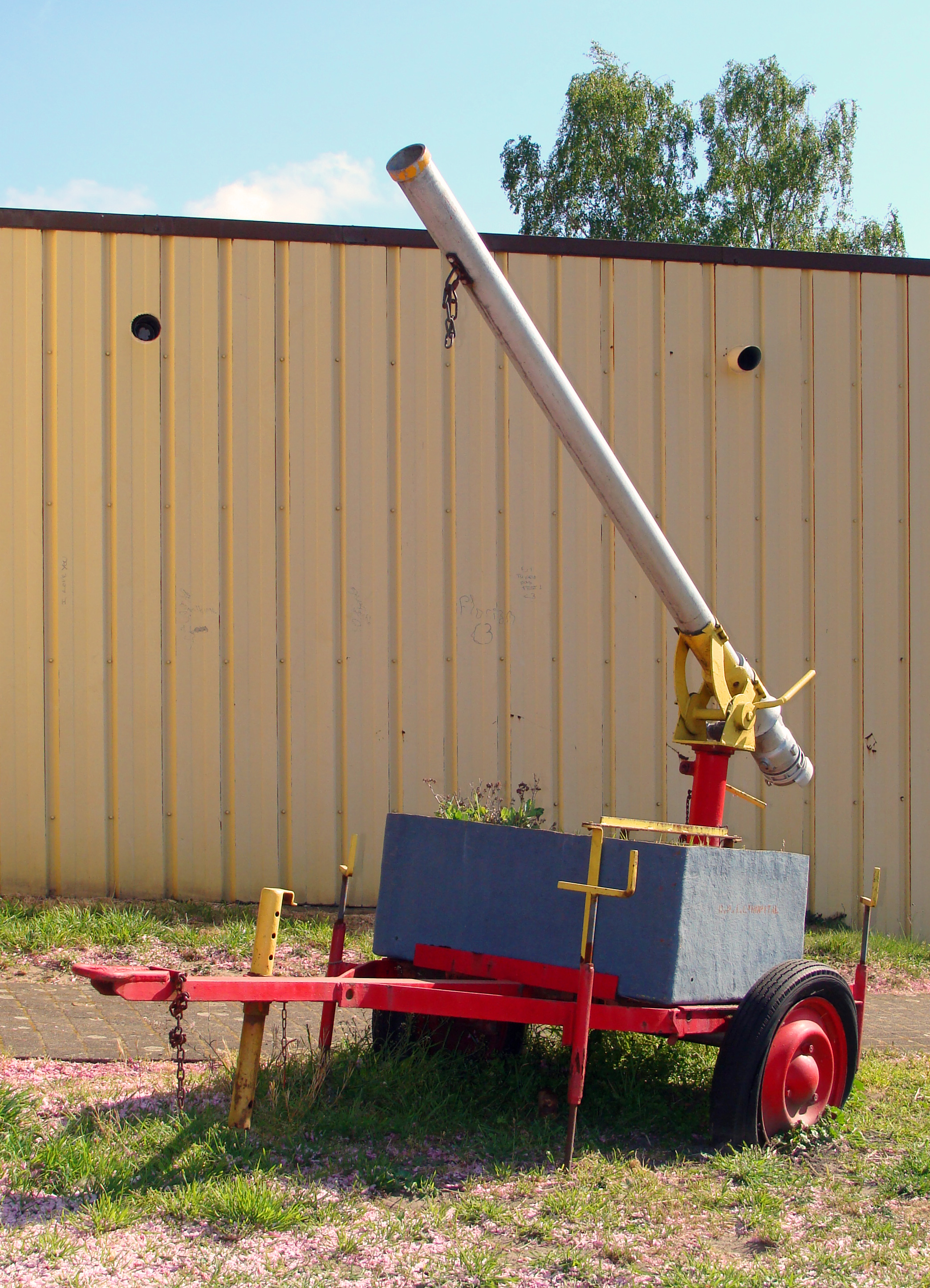 Ancienne pompe à incendie de la ville de L'Hôpital (Moselle), place du Marché